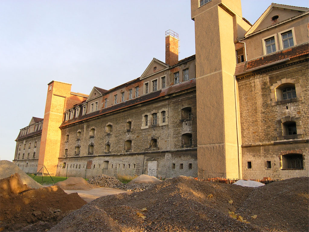 Rückseite der Defensionskaserne (errichtet zwischen 1828 und 1831) mit Anbau von Aufzügen aus der ehemaligen DDR, in der Zitadelle Petersberg in Erfurt